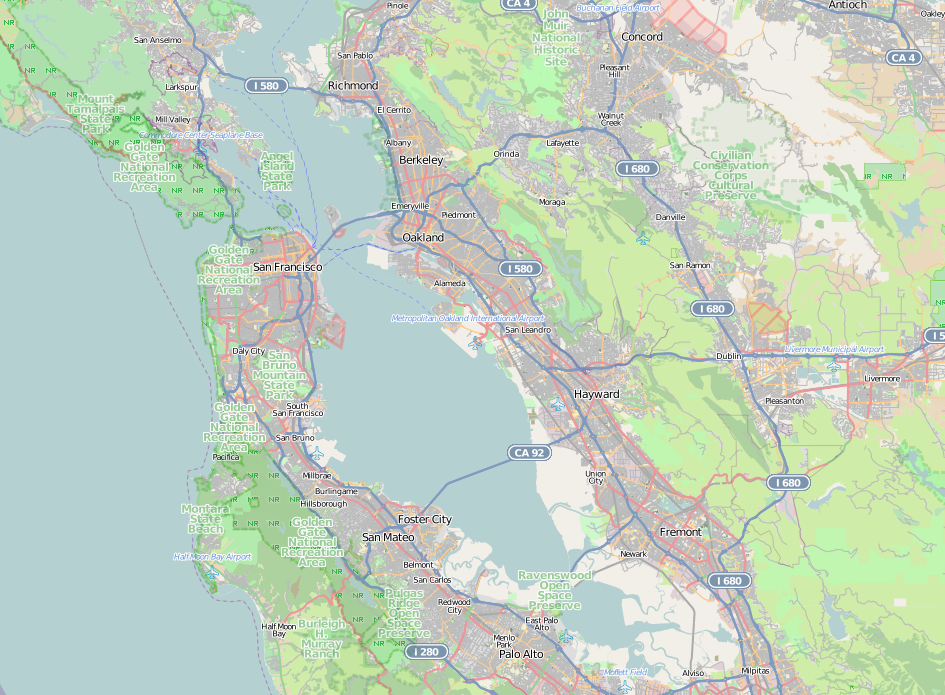 Description This map of San Francisco Bay Area was created from OpenStreetMap project data, collected by the community. This map may be incomplete, and may contain errors. Don't rely solely on it for navigation. AuthorOpenStreetMap contributorsDate (see file history)Sourceopenstreetmap.orgPermission(Reusing this file) OpenStreetMap data and maps are licensed under the Creative Commons Attribution-ShareAlike 2.0 license (CC-BY-SA 2.0).